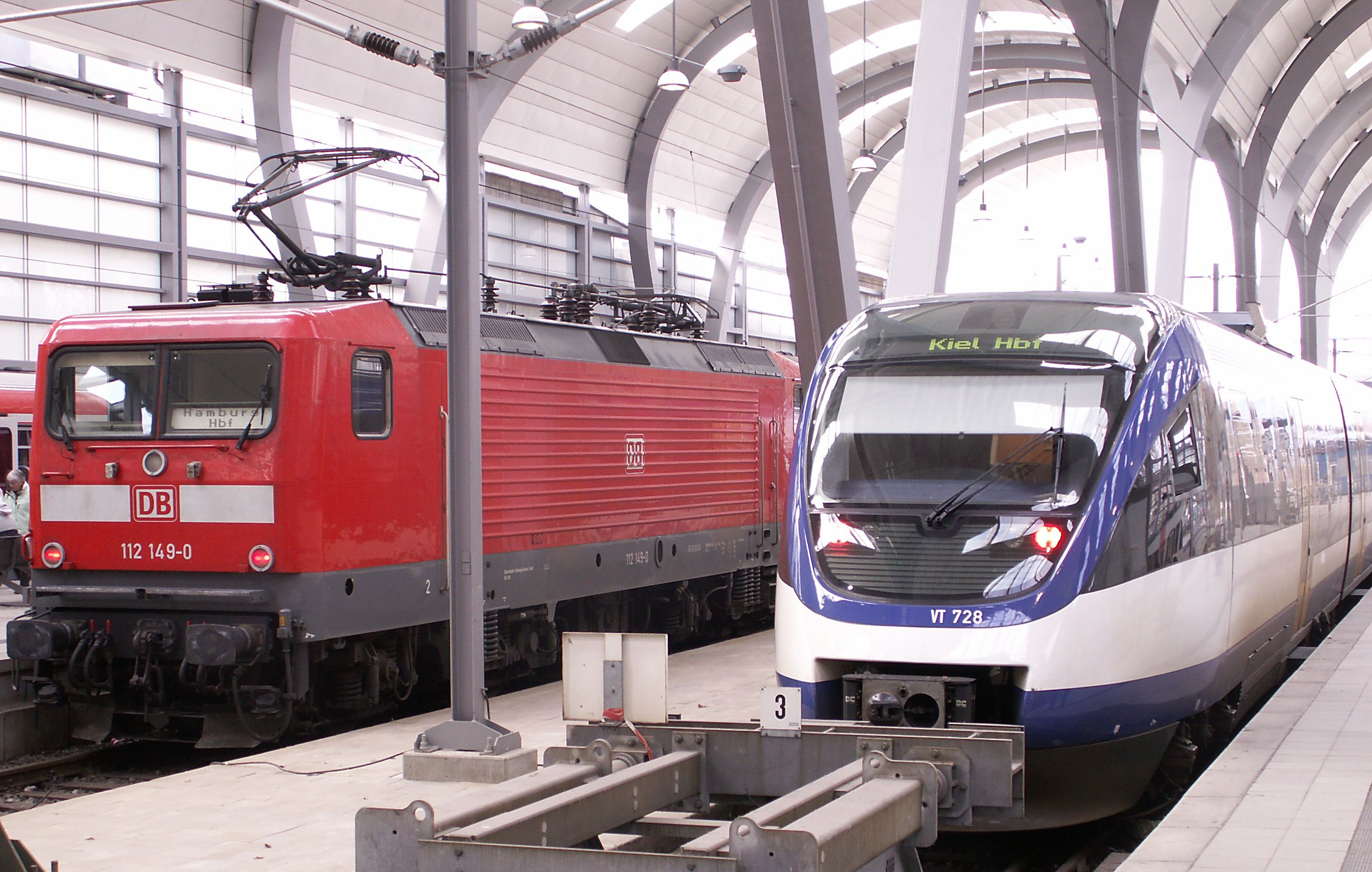 DB 112 149 im Kieler Hbf